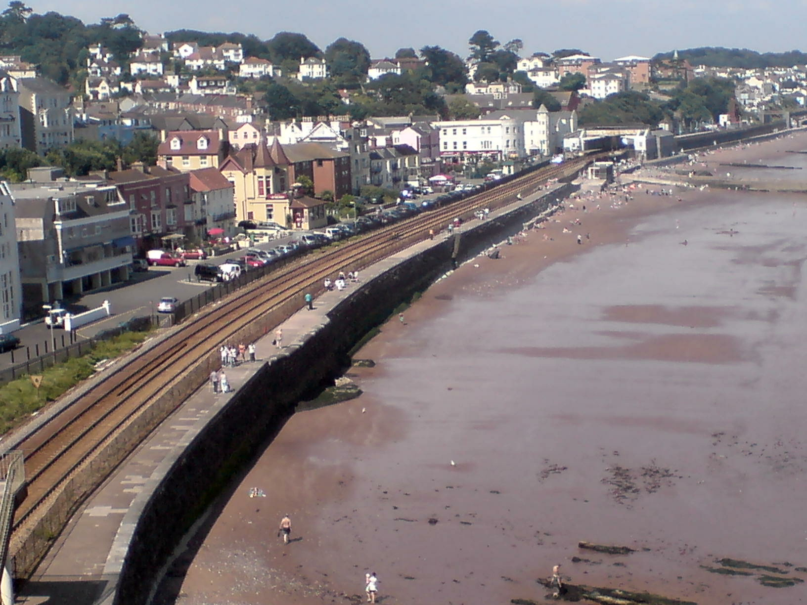 Dawlish